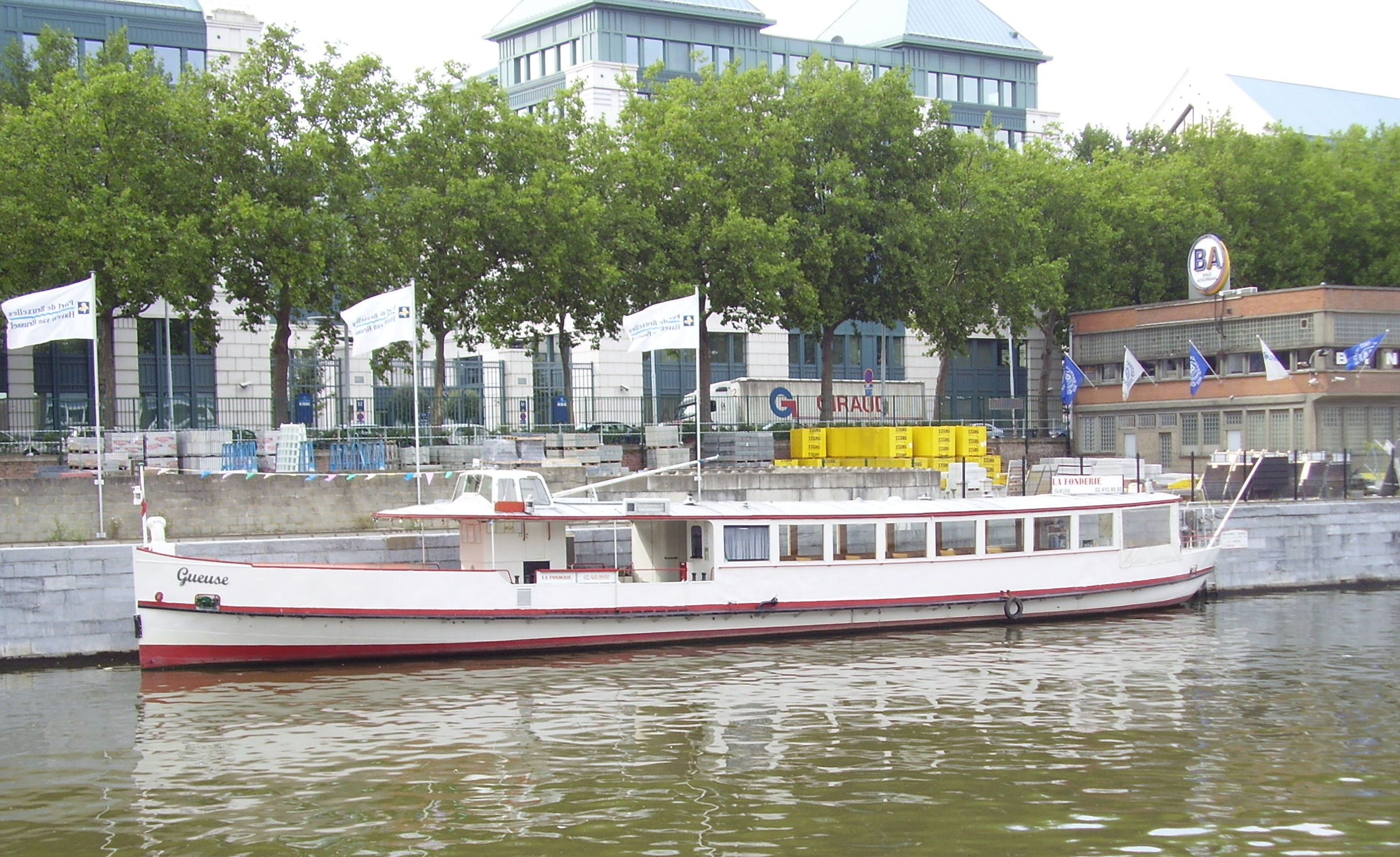 La Gueuse, bateau de La Fonderie destinée au parcours découverte du port et des canaux de Bruxelles, amarrée quai des matériaux (1000 Bruxelles). Ce bâteau a été construit en 1939 sous le nom de Möve pour l'Exposition Nationale Suiise de Zurich. Il a été repris par la Navigation du lac de Zurich pour les navettes Stäfa/Männedorf/Uetikon - Wädenswil/Richterswil. Revendu à la Fonderie en 1999.